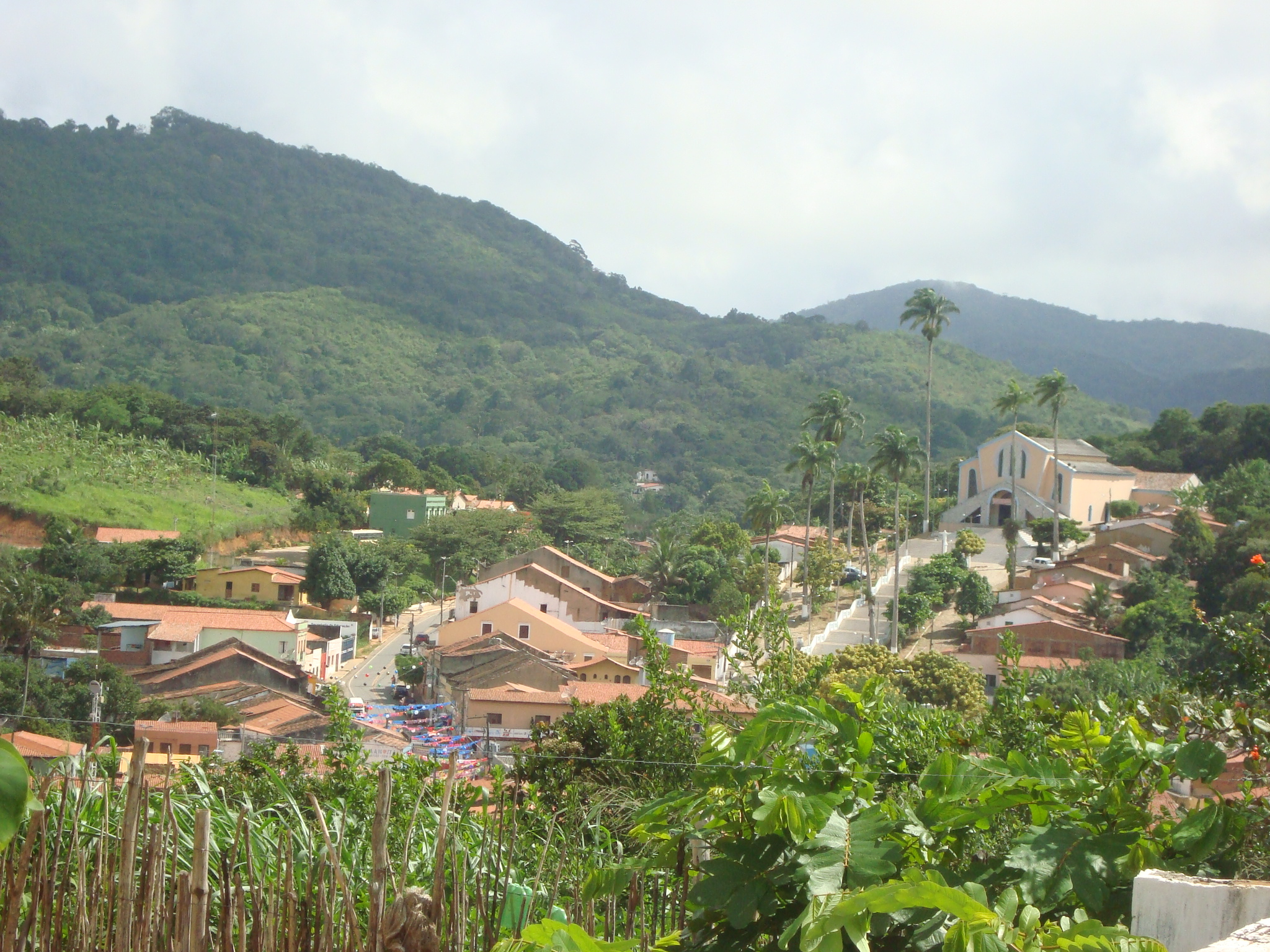 Mulungu